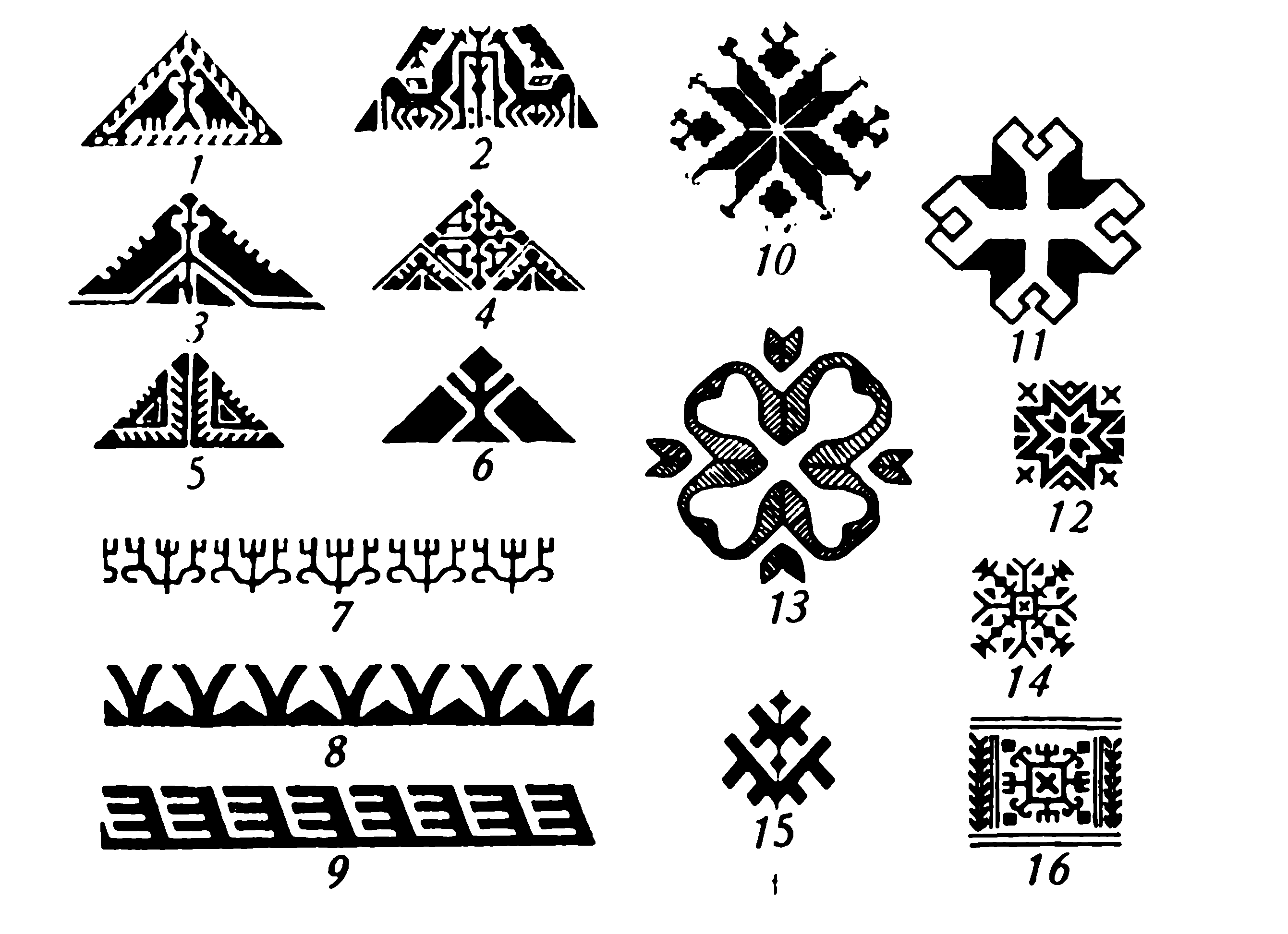 Пятый орнаментальный комплекс составляют противостоящие птицы или животные, разделённые деревом или фигурой, восьмиконечные звёзды, а также другие мотивы, в большинстве производные от первых.